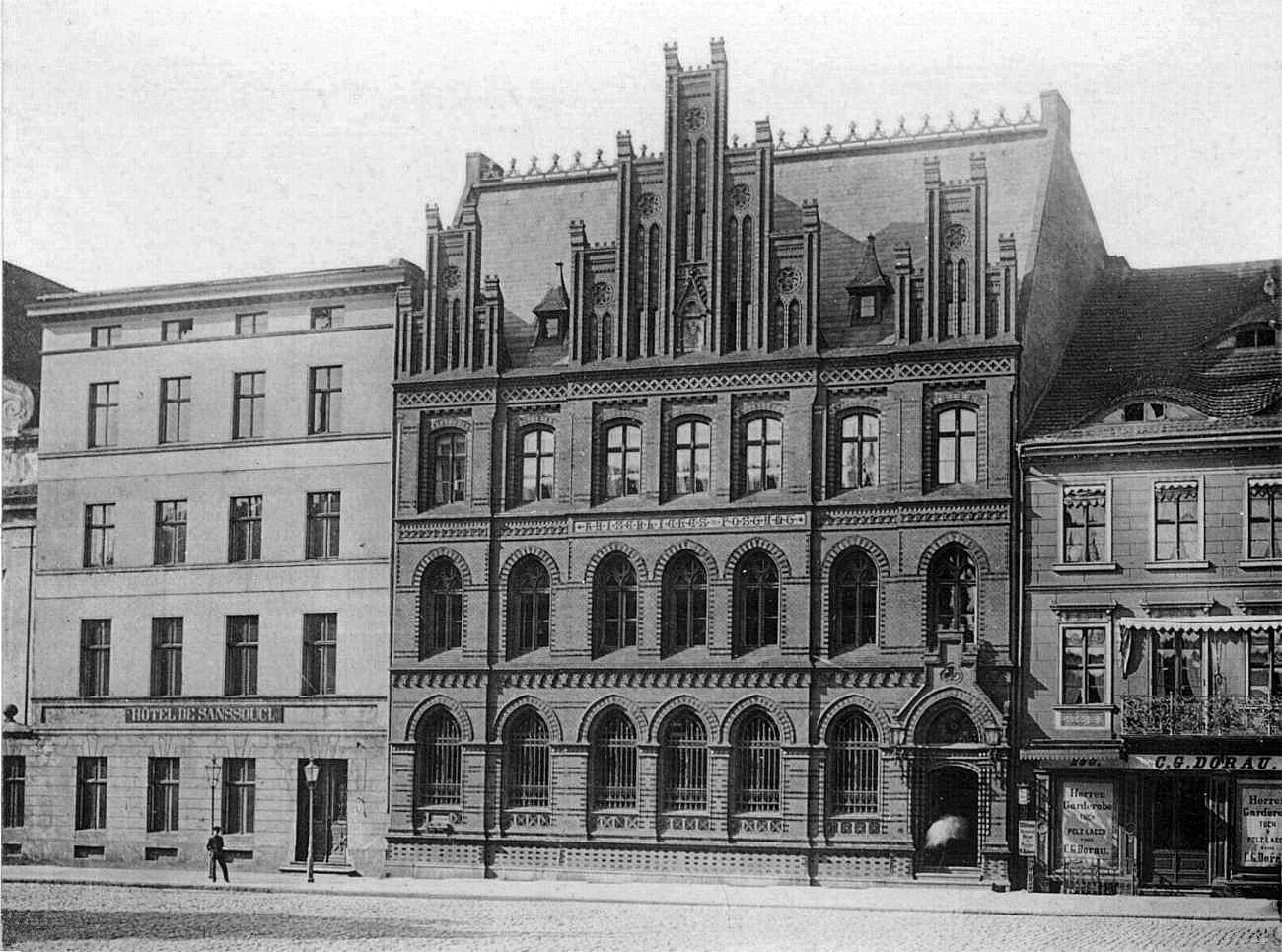 Hôtel de Sanssouci (po lewej) oraz urząd pocztowy na Rynku Staromiejskim w Toruniu